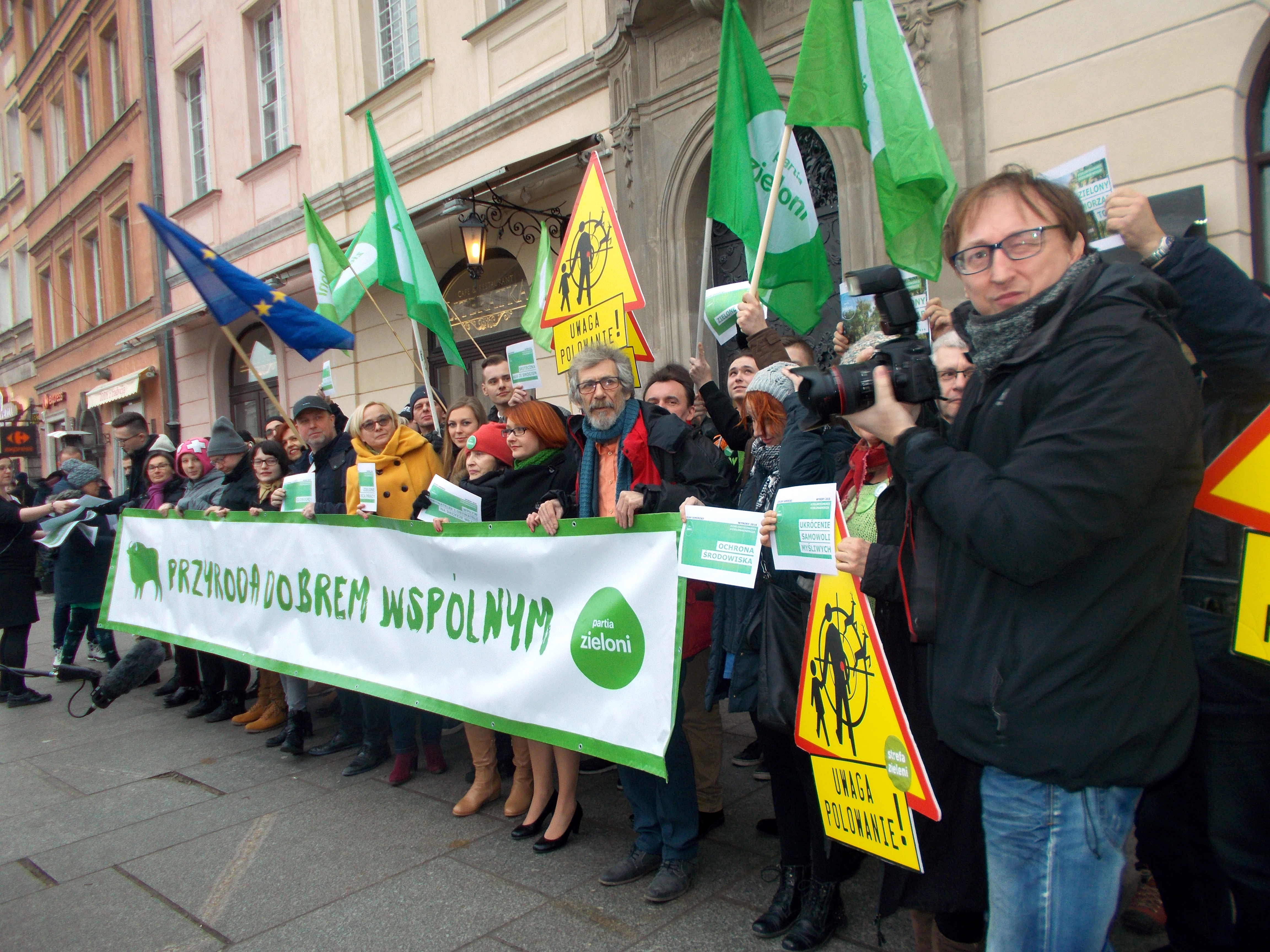 Event podczas kongresu Partii Zieloni w Warszawie w lutym 2018 r.